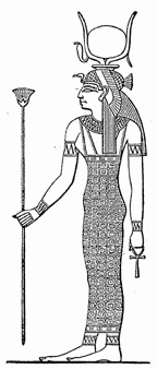 Hathor.